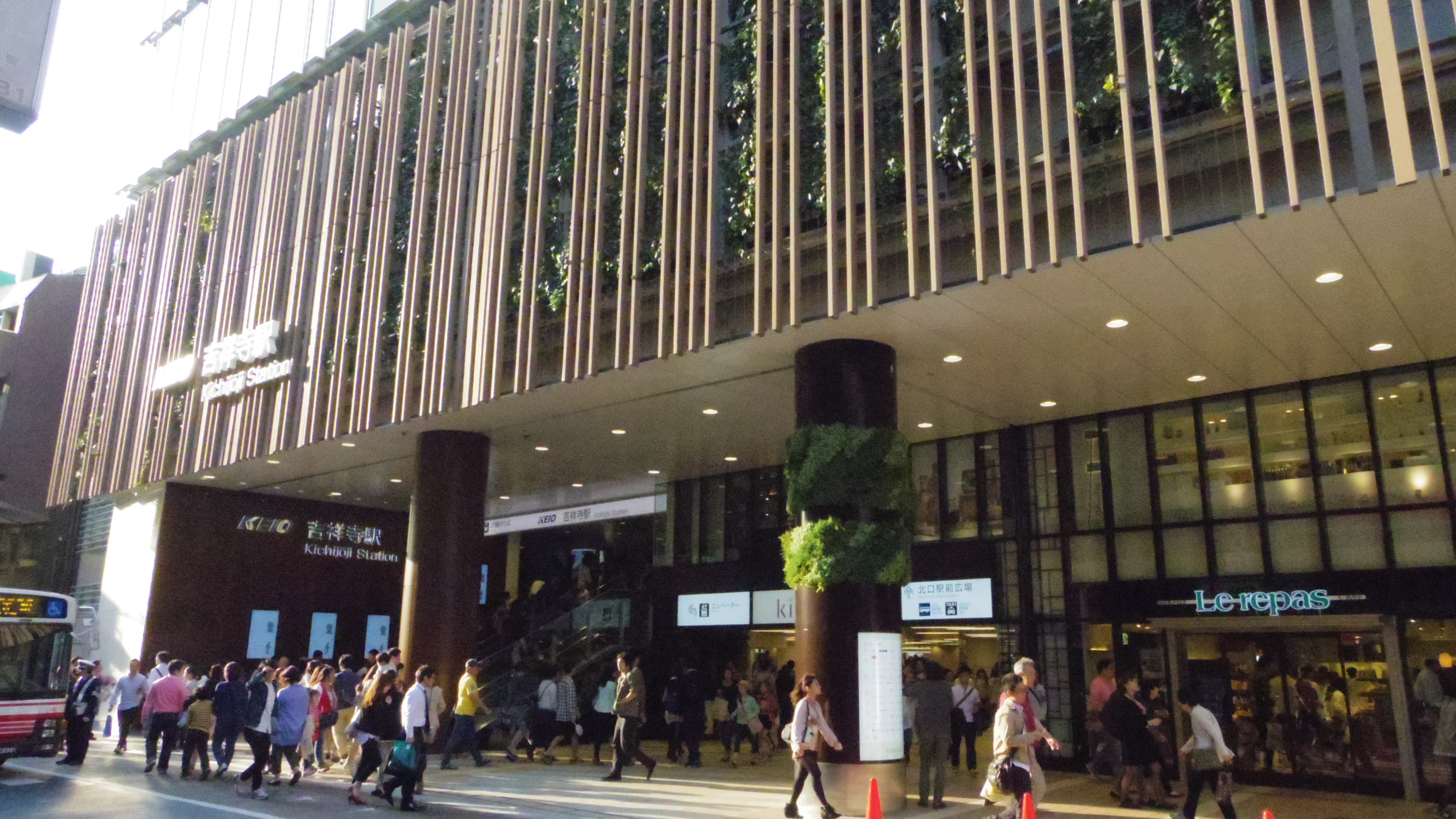 京王井の頭線・吉祥寺駅南口。2014年4月撮影。